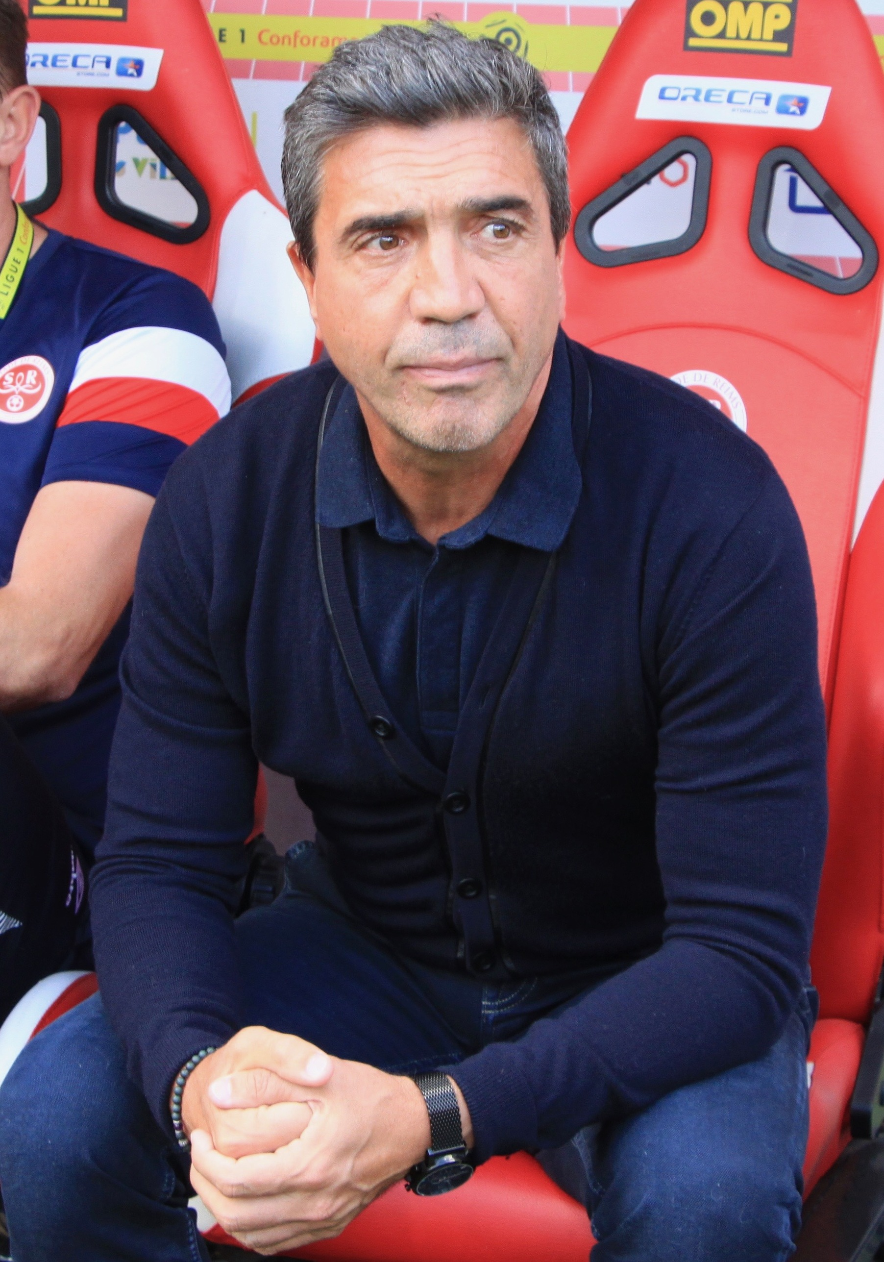 David Guion, le 21 avril 2019, lors de Reims - Saint-Étienne, accompagné de son adjoint, Stéphane Dumont.